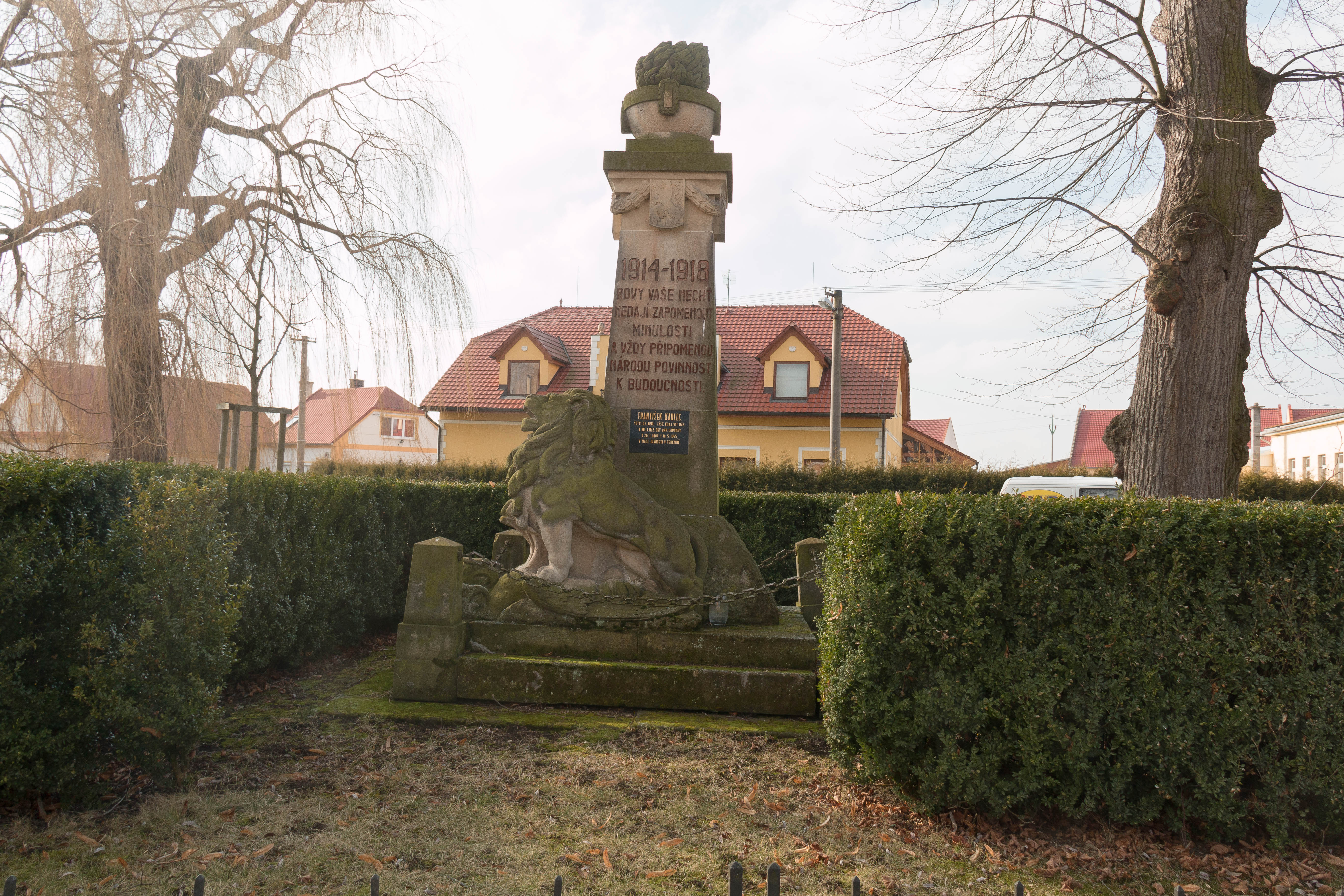 Vlčnov u Chrudimi pomník padlých